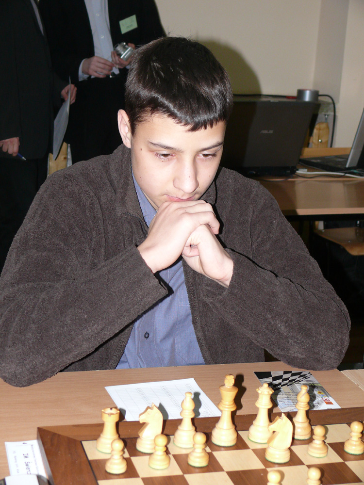 IM Dariusz Świercz Poland, Cracow 2009